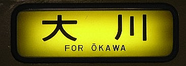 方向幕；大川